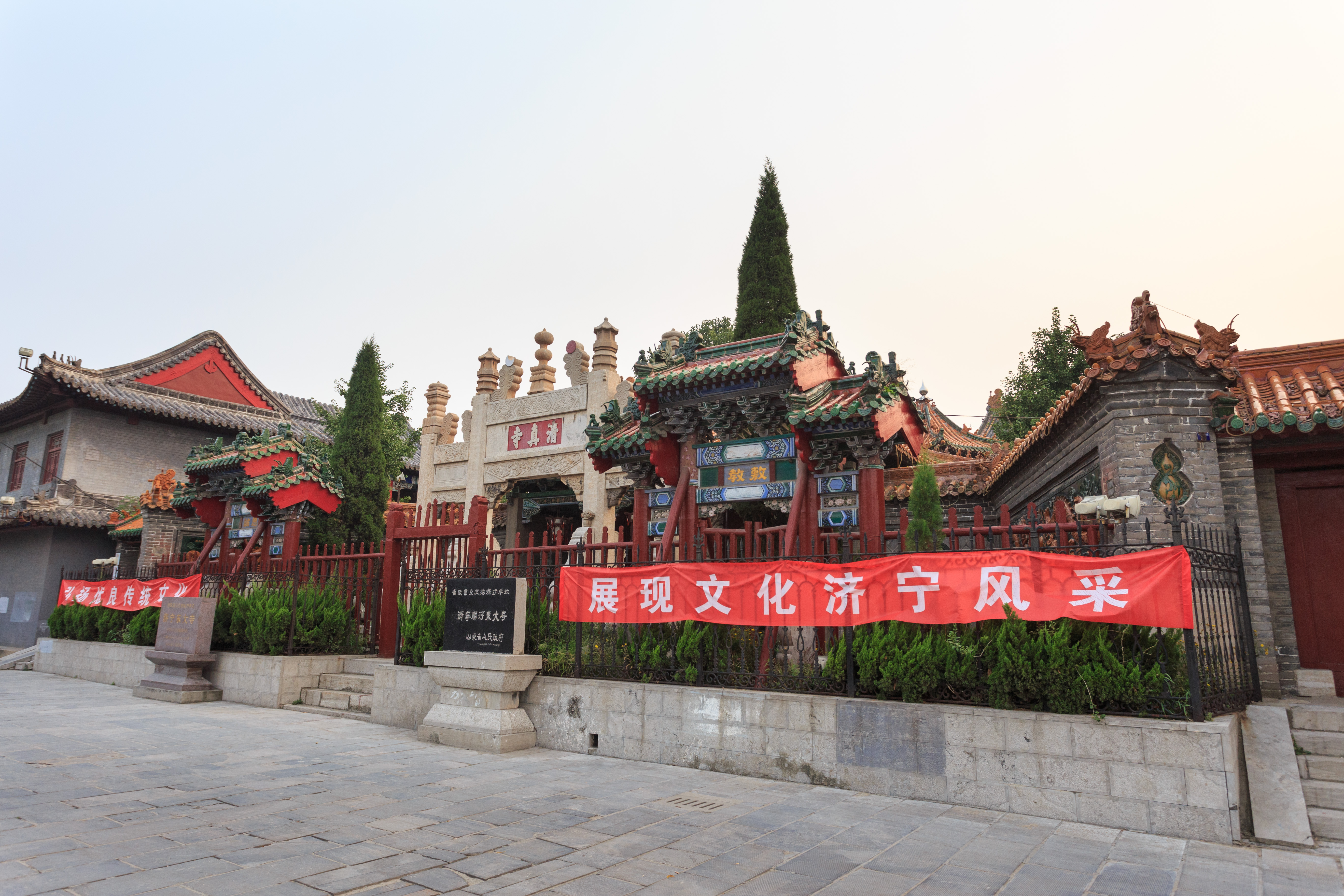 济宁东大寺 正面（东面）